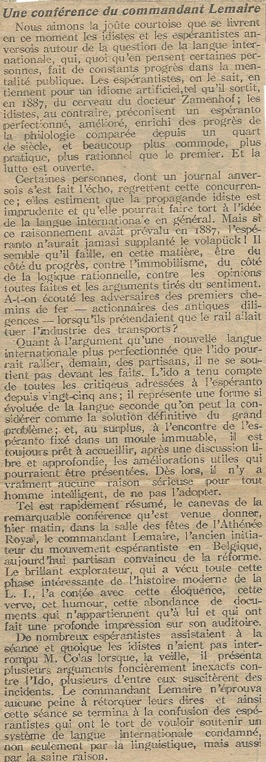 Artikolo pri Esperanto-Ido; konferenco Komendanto Lemaire en Antverpeno proksimume en 1910